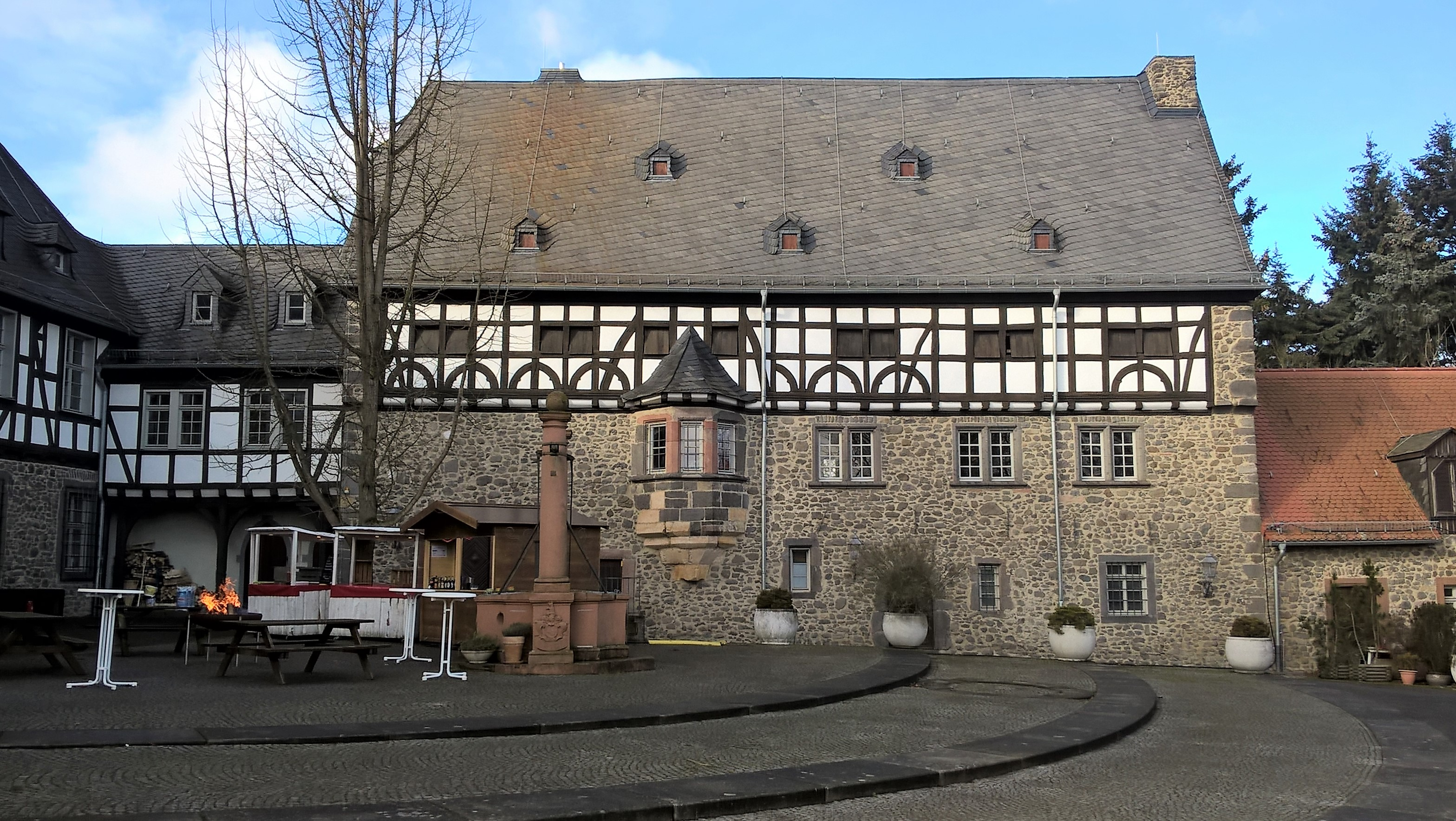 Kloster Schiffenberg, Landkreis Gießen, Hessen, Deutschland